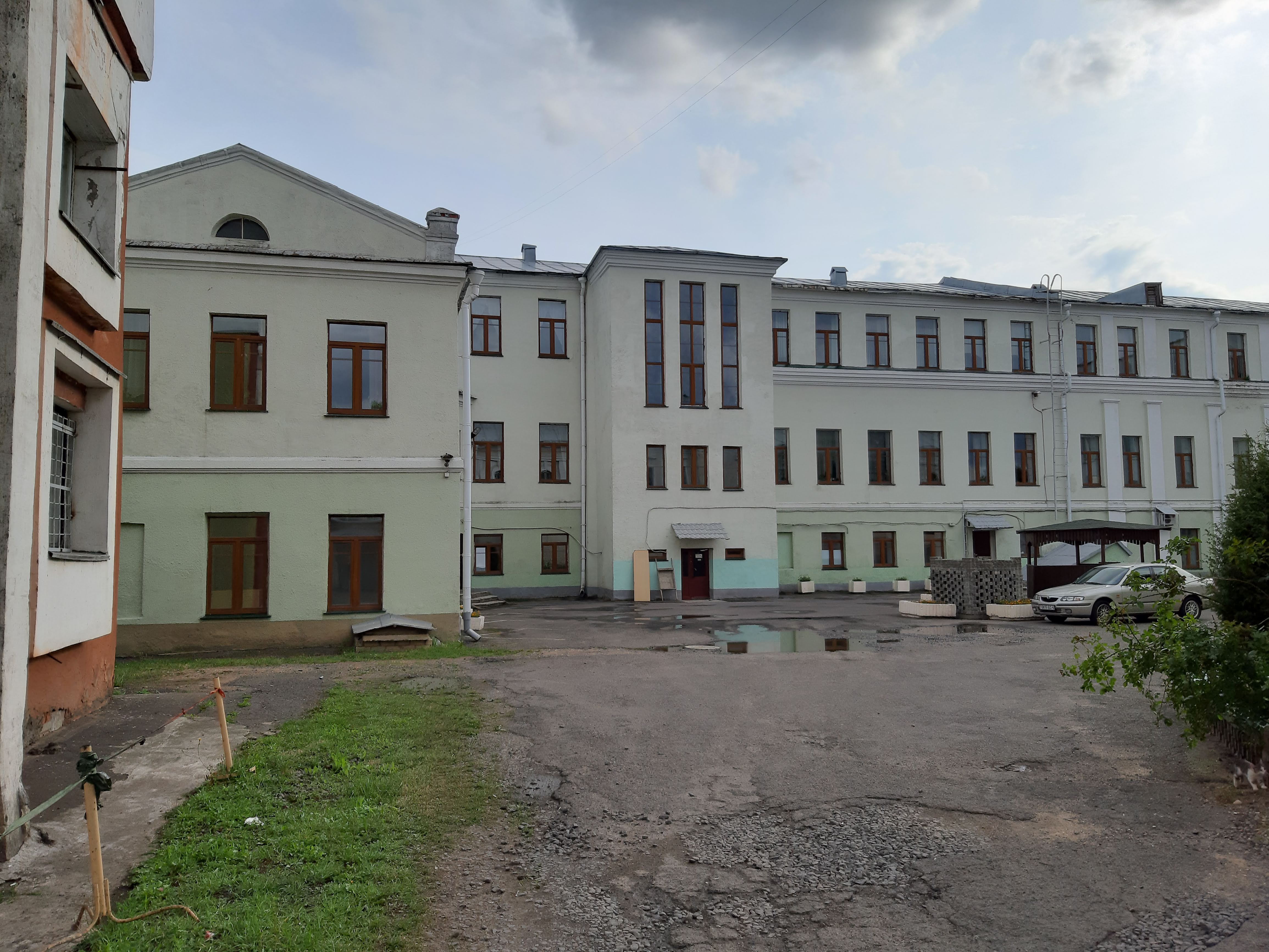 Магілёў. Вакол палаца архібіскупа